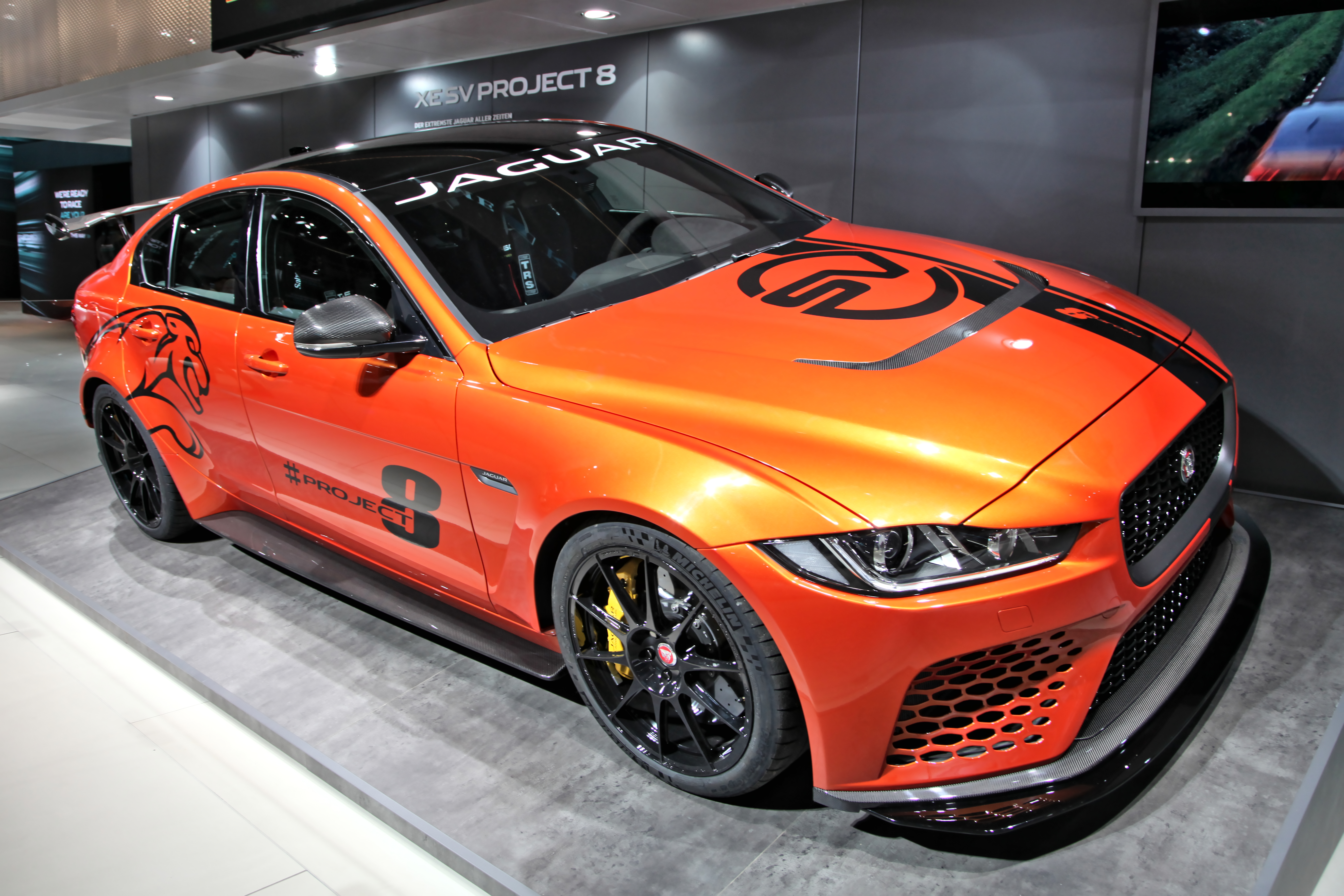 Jaguar XE SV Project 8